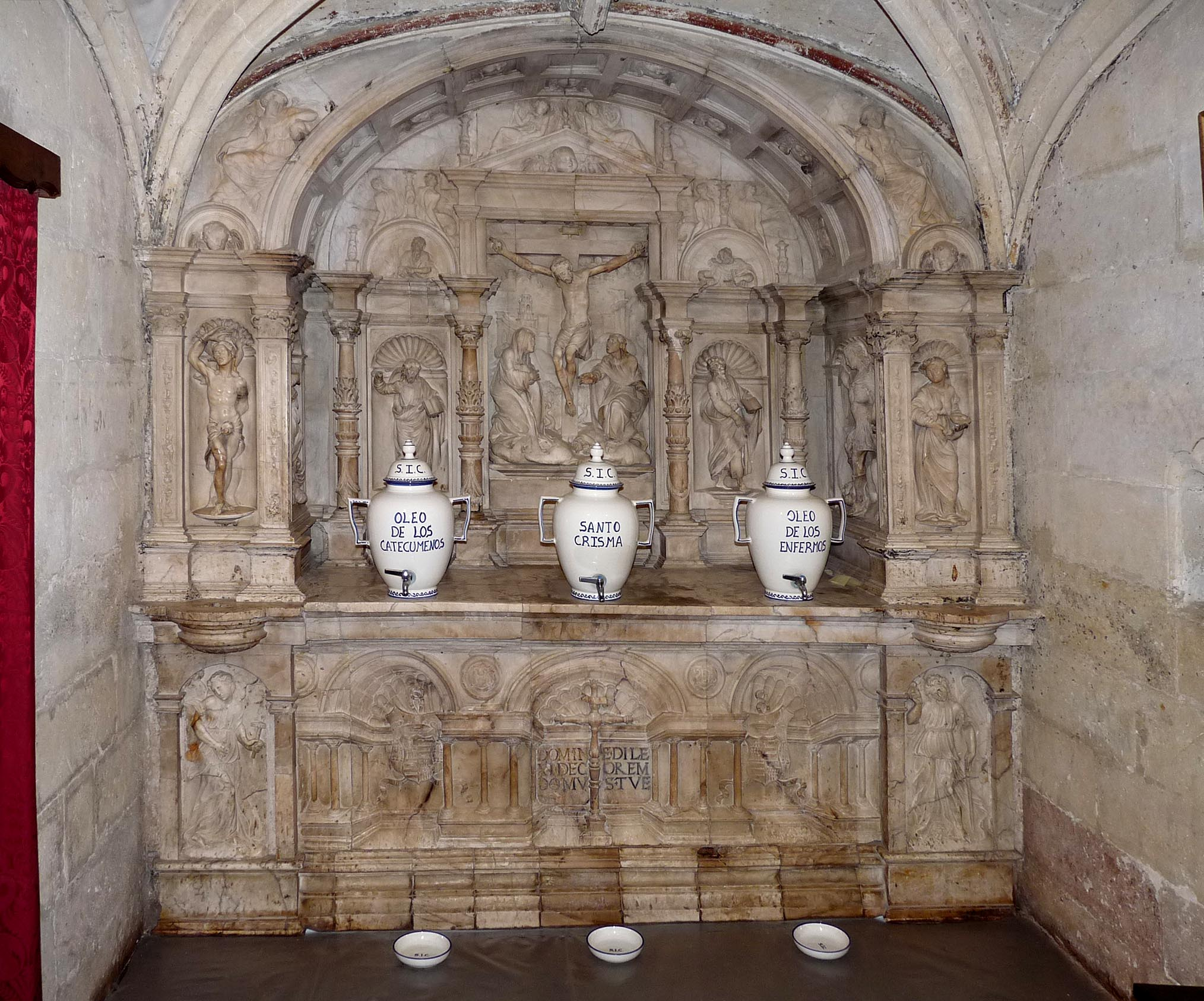 Capilla de San Bernabé de la Mezquita-catedral de Córdoba, (España).